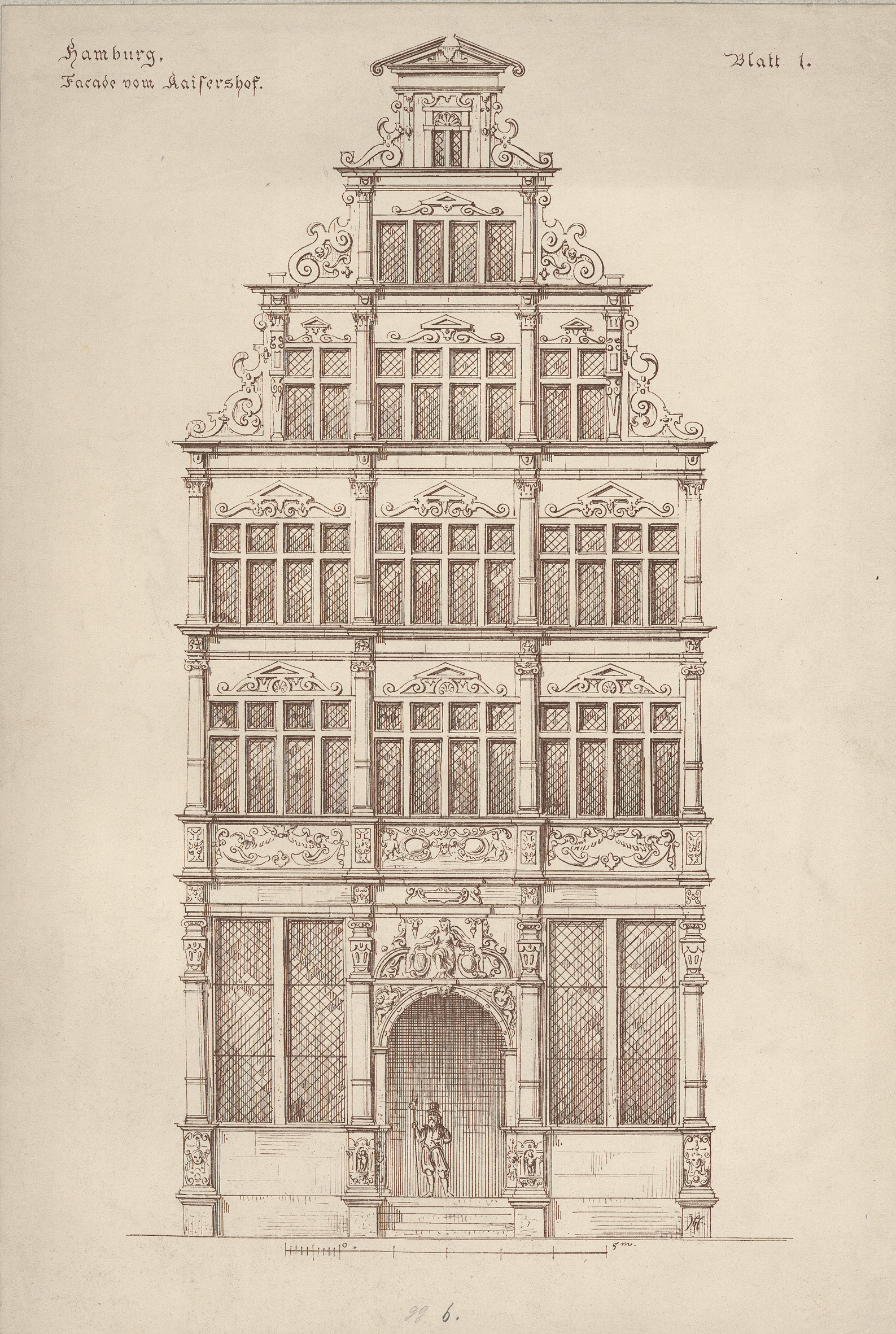 Der Renaissance-Giebel des Kaiserhof entstand 1716. Beim Abriss des Hauses 1871 wurde der Giebel Stein für Stein abgetragen und im Museum für Kunst und Gewerbe, Hamburg, wiederaufgebaut, wo er bis heute zu sehen ist.